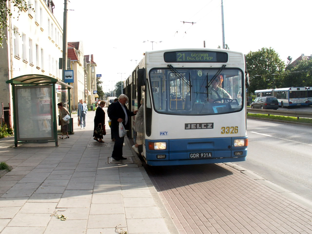 Trolejbus Jelcz PR110E linii 21 na przystanku Reja, kierunek miasto, nr boczny: 3326. Wykonany przez KPNA ze Słupska w 1987 roku.